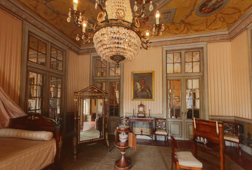 Quarto Império do Palácio Real de Queluz